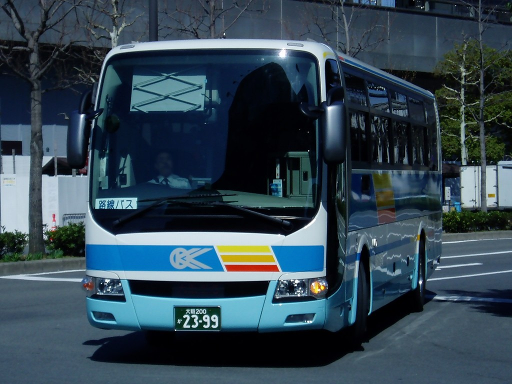 Mitsubishi Fuso Aero Ace use for Osaka-Kuko-Kotsu bus Kyoto line